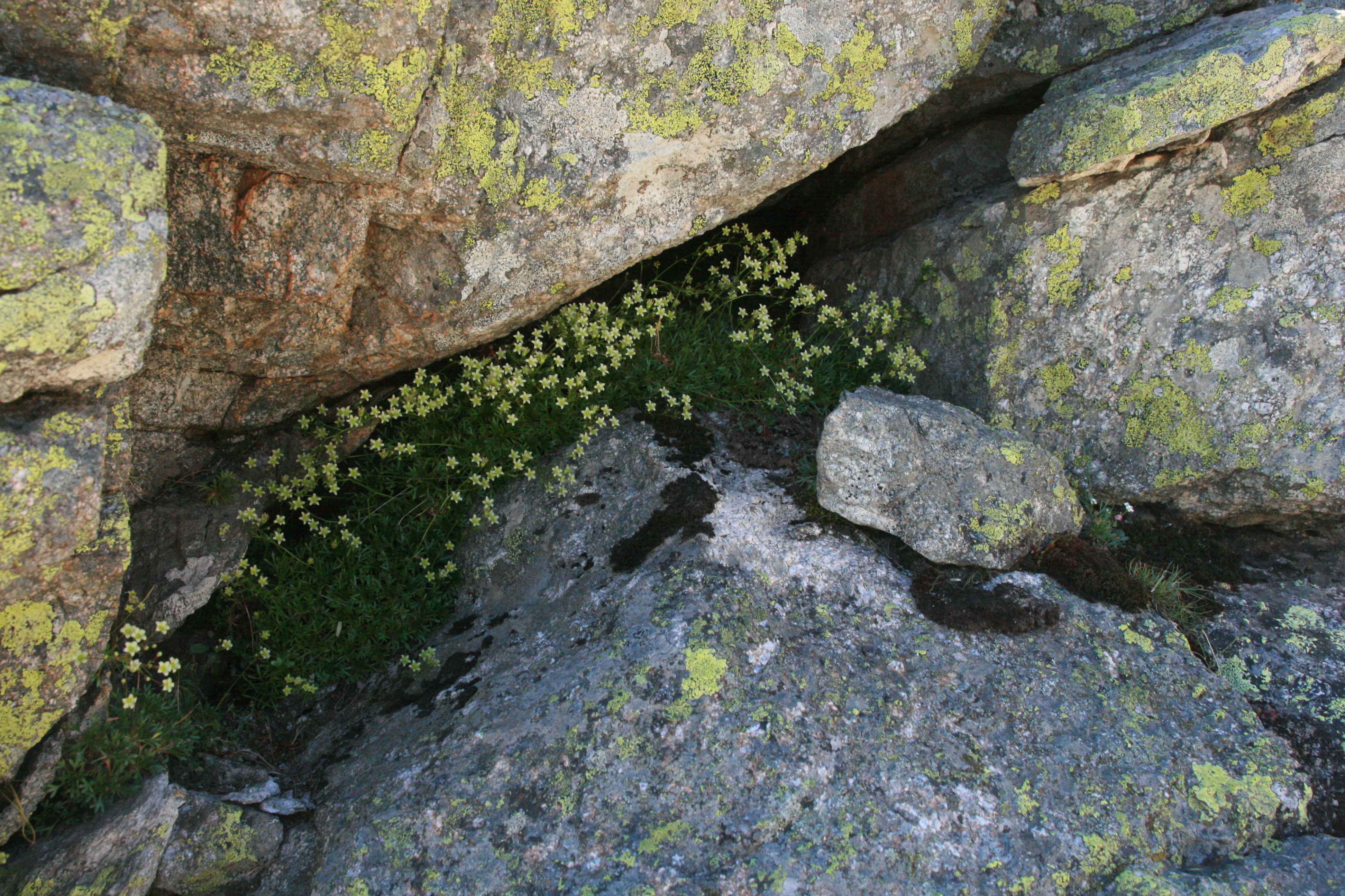 (Saxifraga pentadactylis subsp. almanzorii). Flora en las inmediaciones de la Laguna Grande del Circo de Gredos en la Sierra de Gredos. España This is a photography of a Special Area of Conservation in Spain with the ID: ES4110002. Natura2000 entry, EEA entry